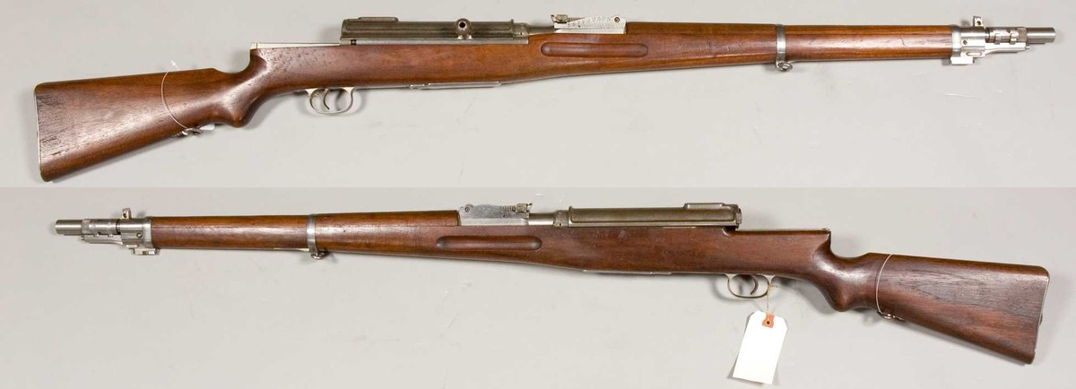 Puška poimenovana po generalu Liu, izdelana leta 1915.